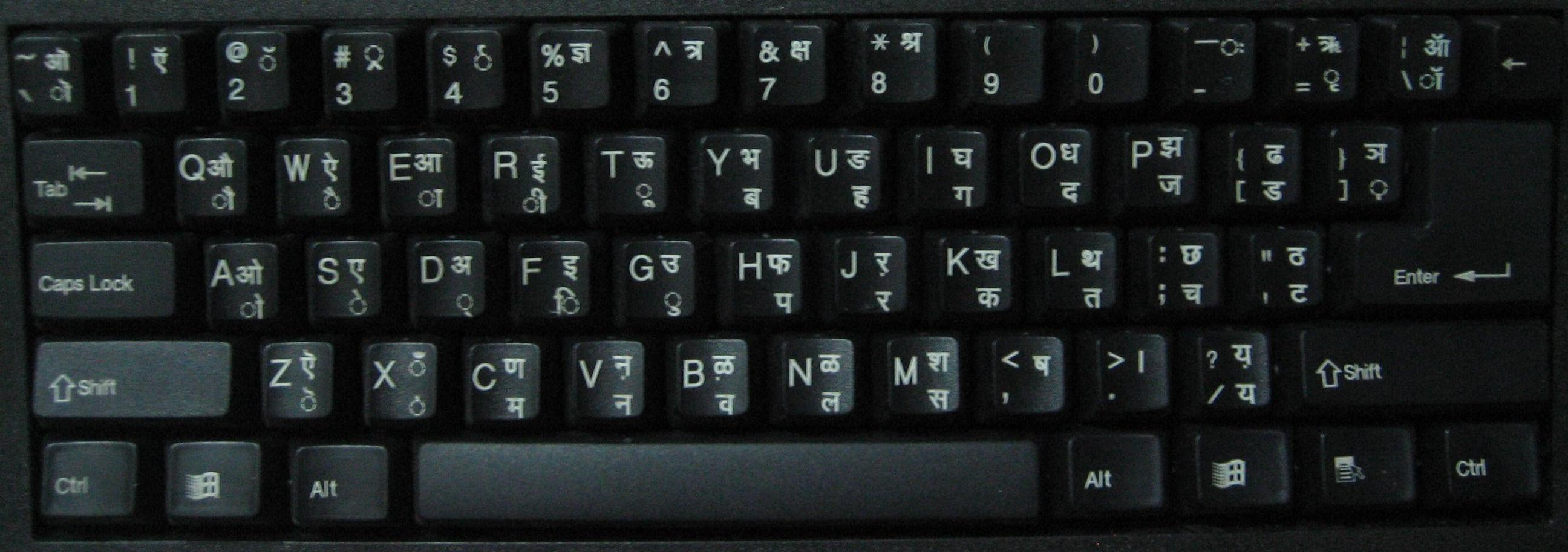 Devanagari INSCRIPT Hindi Keyboard